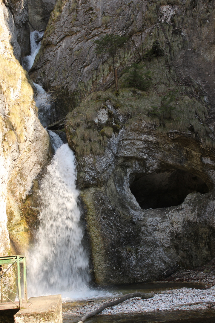 Cascada Oselu